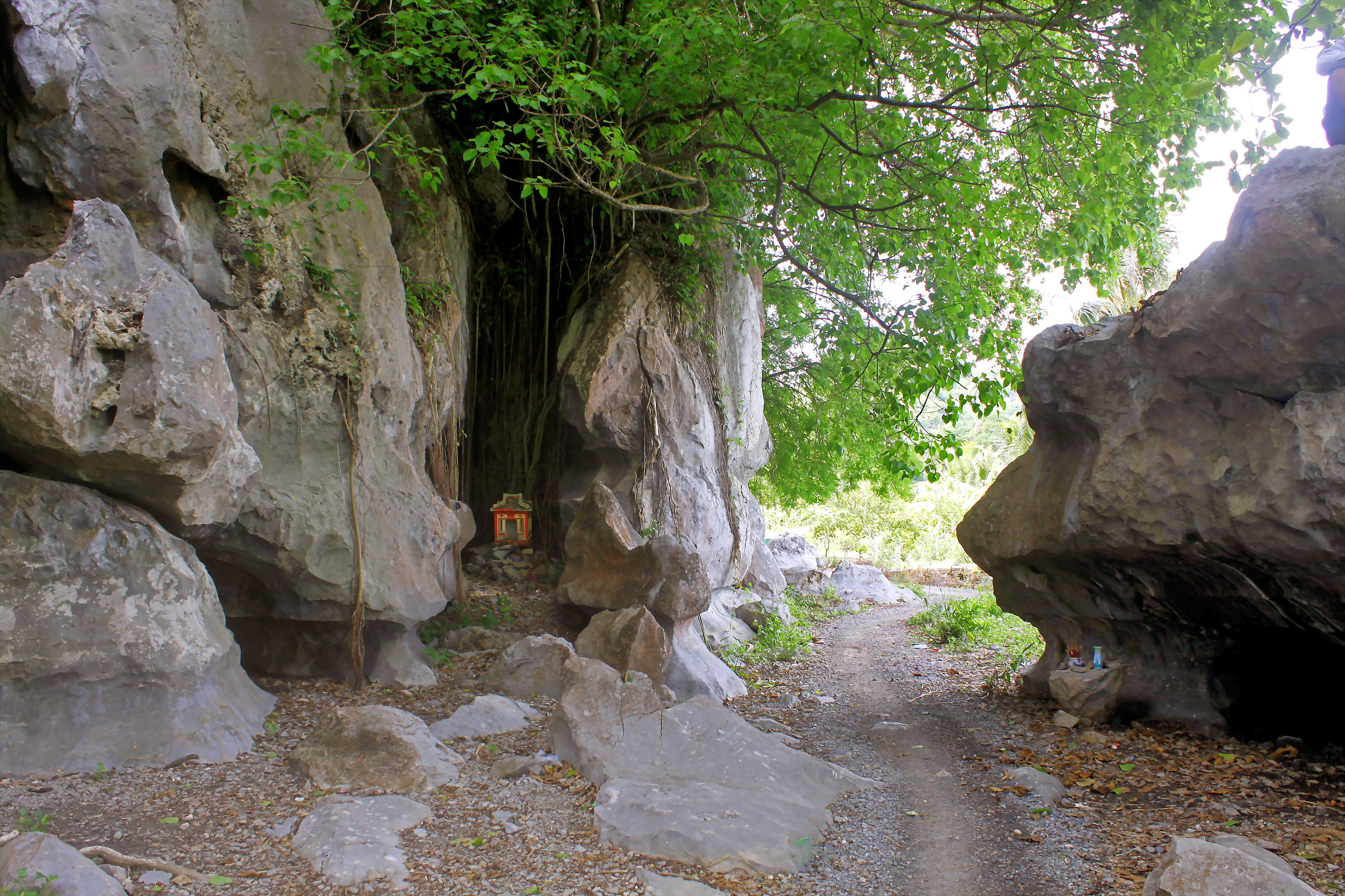 Một con đường nhỏ đi quanh núi Mo So. Núi thuộc ấp Ba Núi, xã Bình An, huyện Kiên Lương, tỉnh Kiên Giang. Đây là một di tích Lịch sử cách mạng và Thắng cảnh cấp quốc gia Việt Nam.